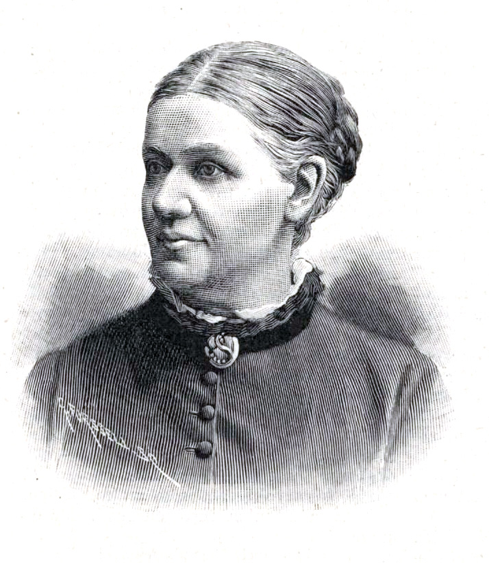 Sigrid Rudebeck (1831-1924)